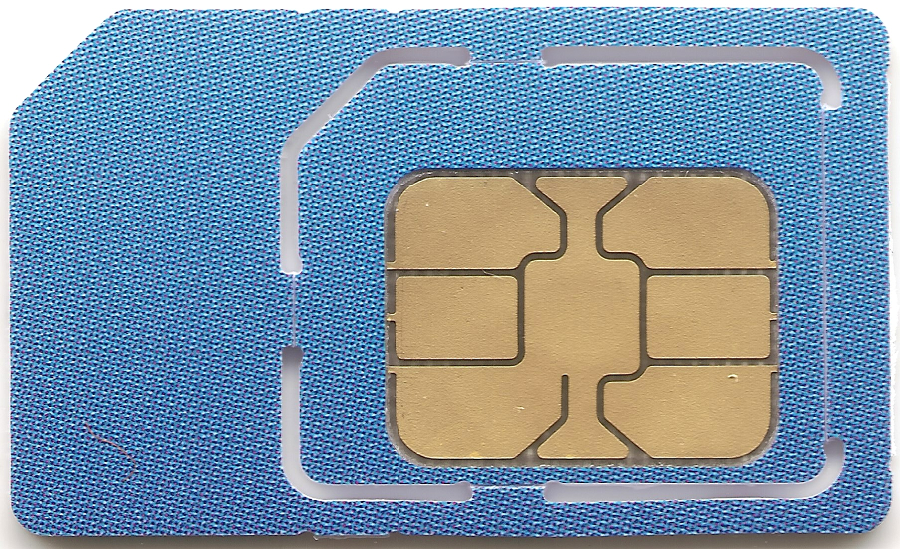 SIM-Karte von Telefónica O₂ Europe mit 2 möglichen Formaten (Standard und Micro, hergestellt 2011 oder 2012), Rückseite